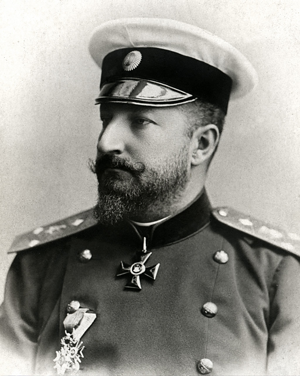 Zar Ferdinand I. von Bulgarien (1861-1948).